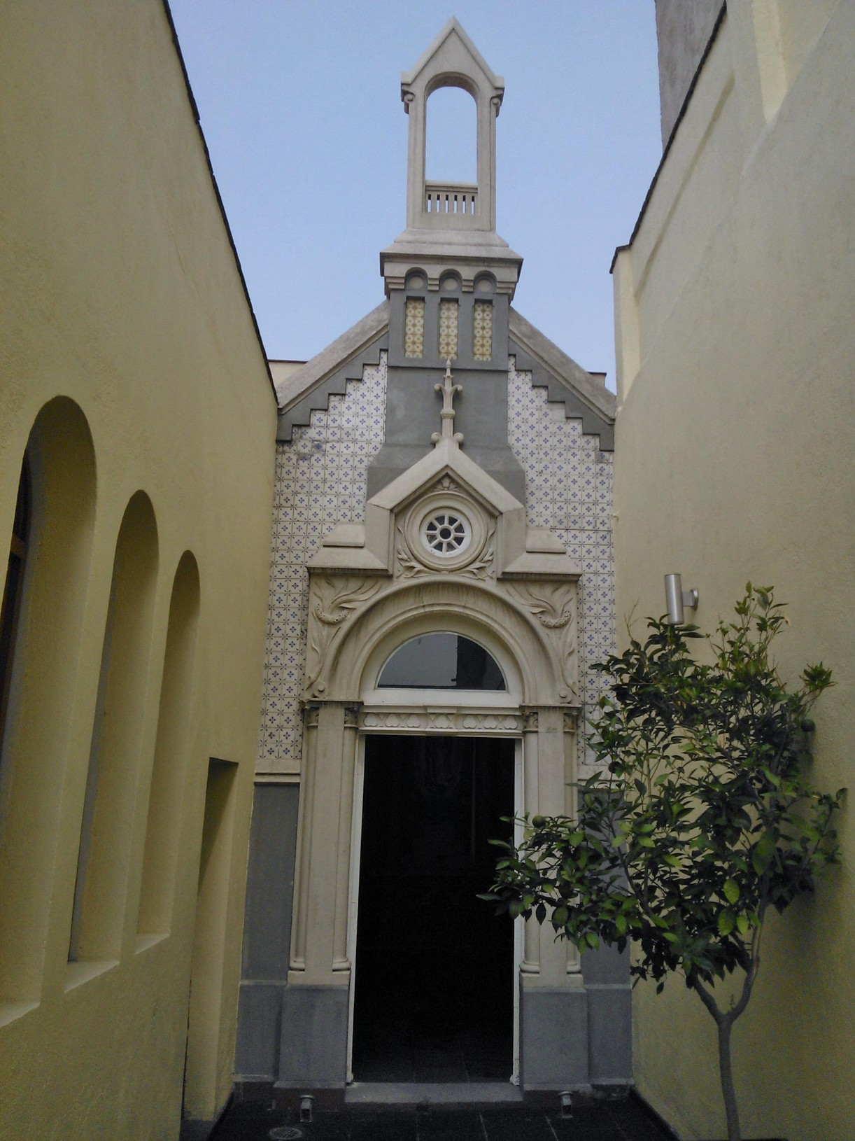 Die Kapelle vom Tagle Haus in Mexiko Stadt